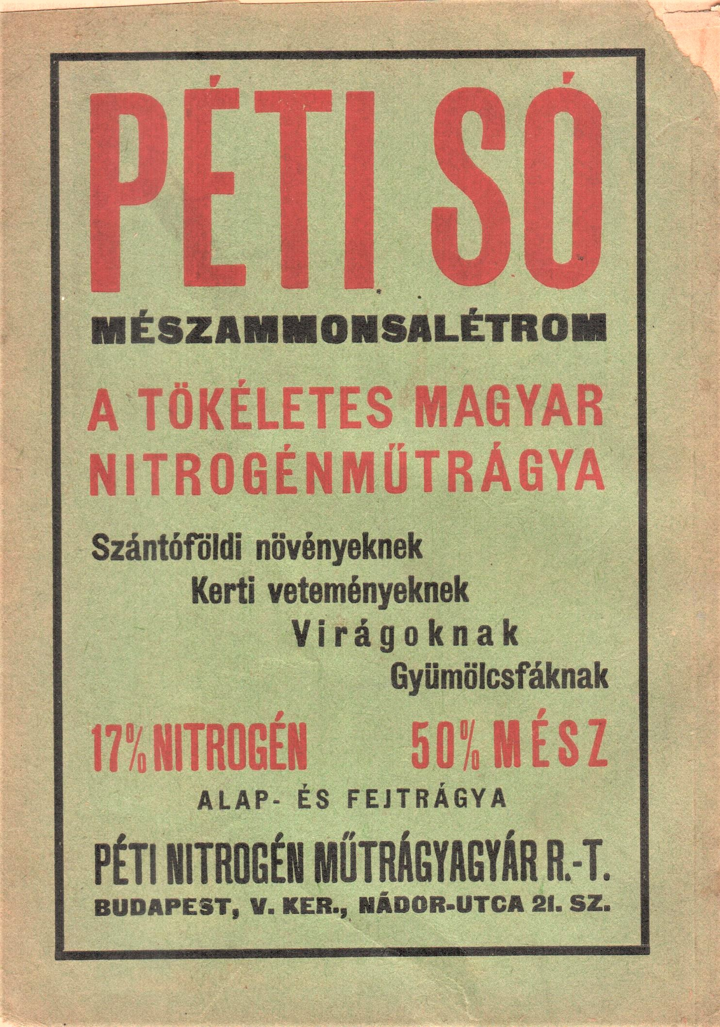 Péti só reklám. Megjelentː Dr. Ballenegger Róbertː A termőföld hibái Királyi Magyar Természettudományos Társulat, Budapest, 1933. (Hátoldal). Yotel 894 DVD.